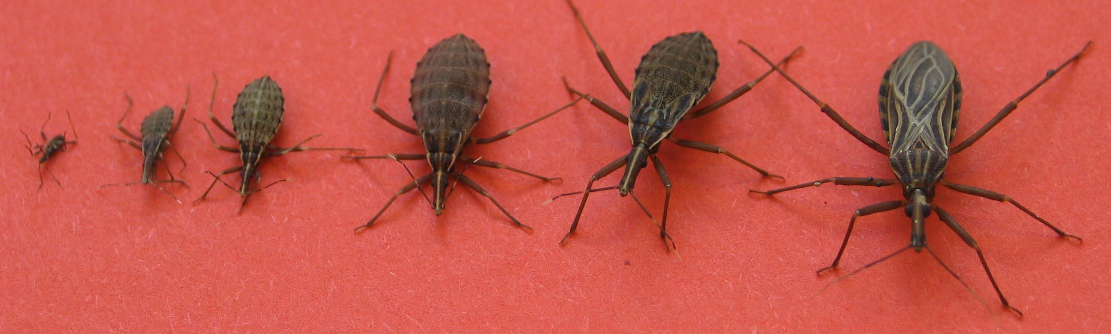 especie: Rhodnius prolixus (ninfas y adultos) autor: Thierry Heger